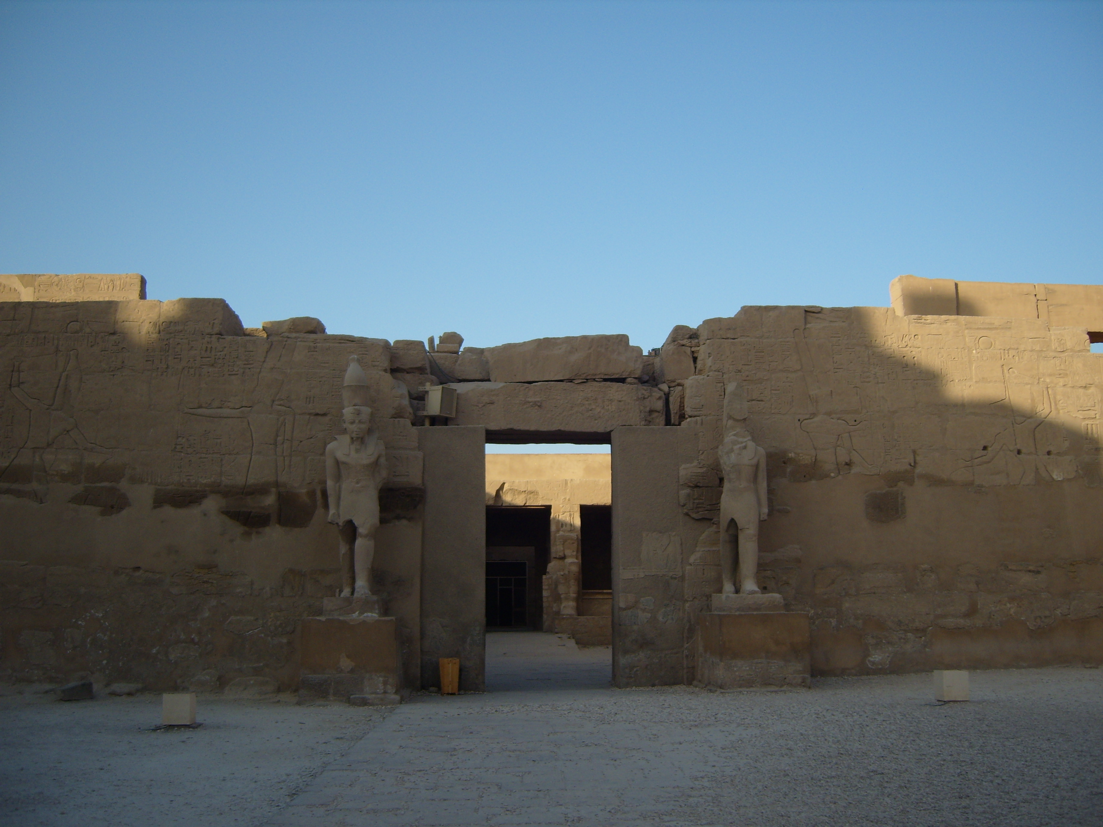 Tempel van Ramses III in het Karnak tempelcomplex in Egypte. Foto van de hoofdingang.